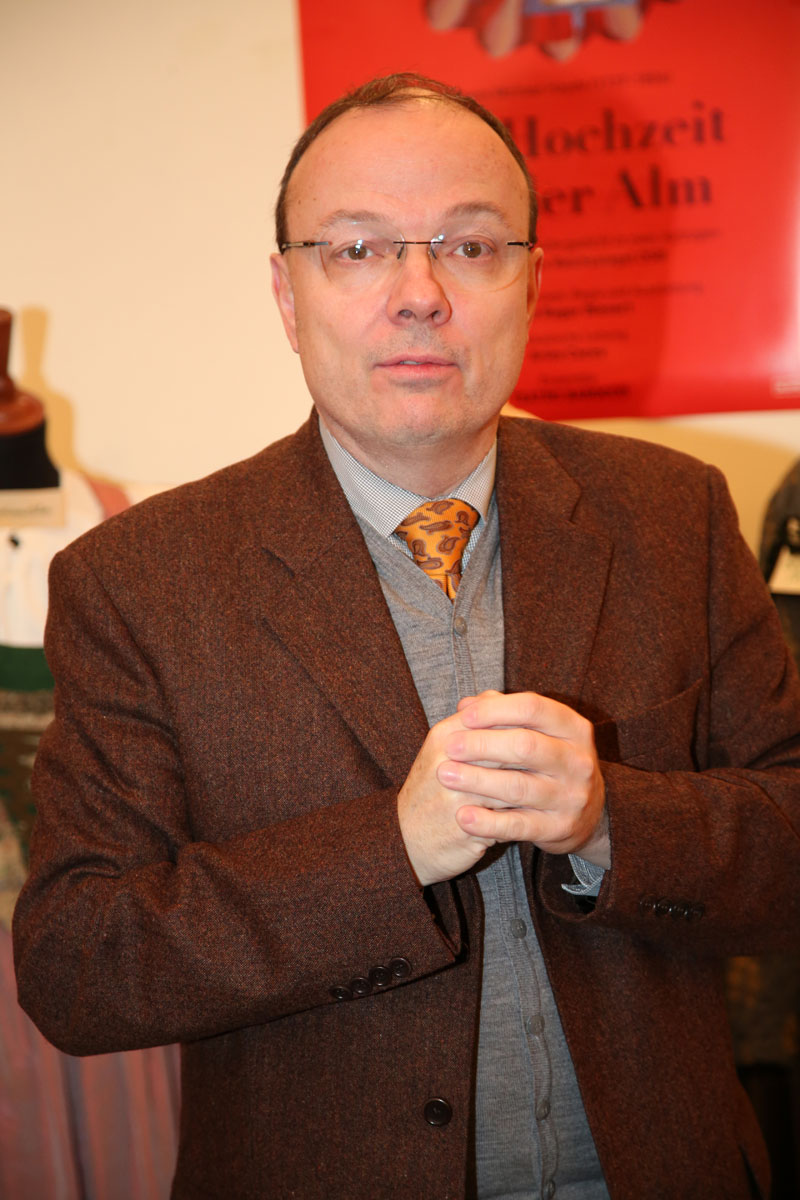 Dr. Wilhelm Sinkovicz-8854